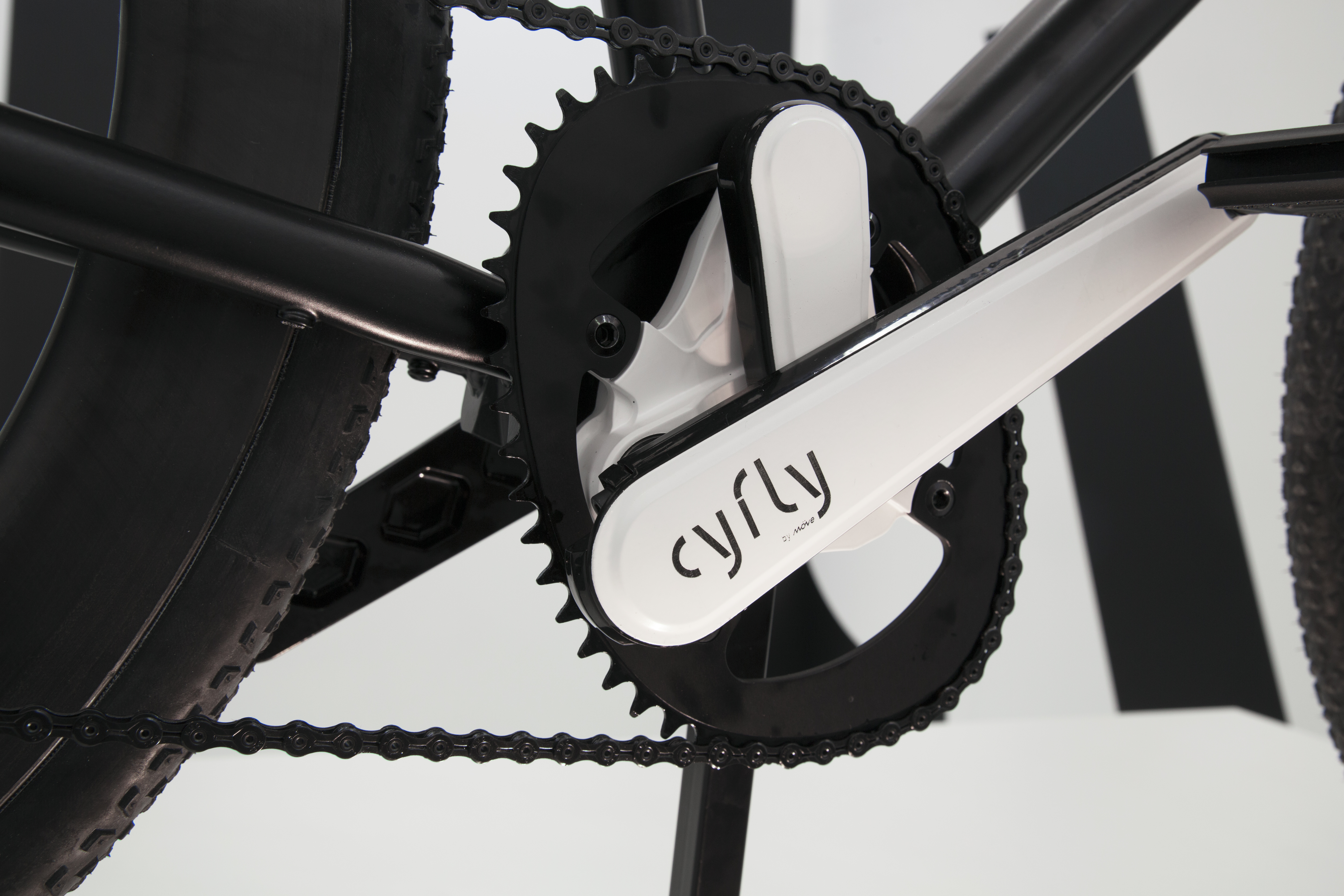 Nahaufnahme von cyfly auf der Eurobike 2016